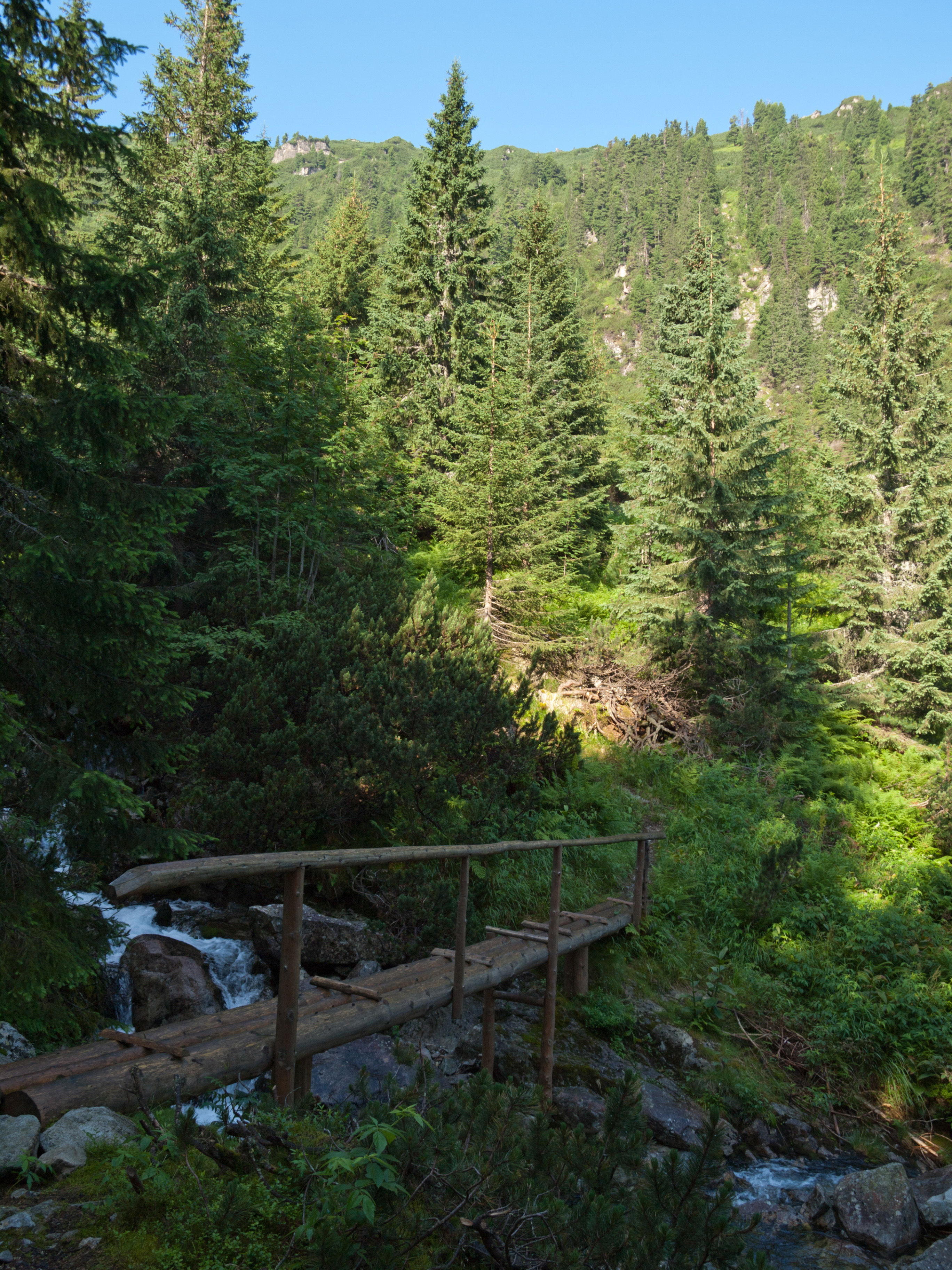 Mostek na Żabim Potoku Białczańskim.